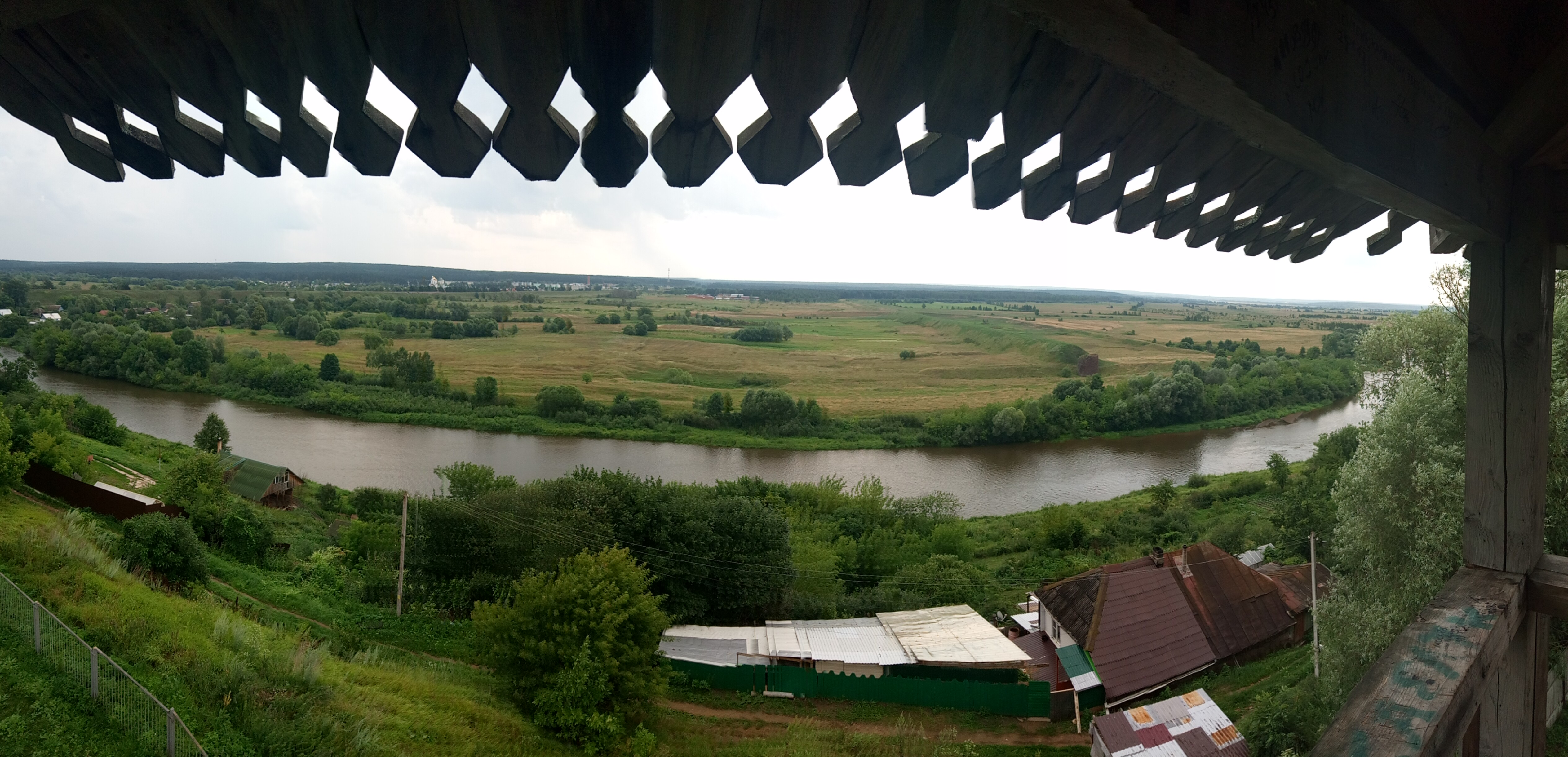 Панорама окрестностей Козельска со сторожевой башни